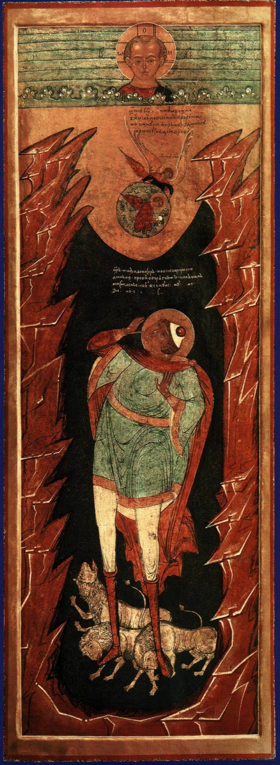 Russian icon of Daniel with lions. Пророк Даниил во рву львином с образом Христа Эммануила в небесах. Боковая дверь иконостаса. XVII век. Поволжье Пророк Даниил во рву львином. Боковая дверь иконостаса 17 век. Поволжье Дерево, левкас, темпера. 170х61 см. В вытянутый по вертикали формат искусно вписан основной сюжет, дополненный эпизодом посещения Даниила пророком Аввакумом. Композицию завершает образ Христа Эммануила в небесах. Изображения Даниила во рву львином были характерны для боковых дверей русских иконостасов XVI- XVII веков. В настоящее время подобные произведения являются редкостью. Икона исполнена в легкой, свободной манере; с особым изяществом нарисованы фигура Даниила и как бы взбегающие к небу горки. Творческая свобода иконописца в обращении с художественным наследием рубежа XVI- XVII веков свидетельствует о хронологической близости памятника этому периоду. Икона может быть датирована первой третью XVII в. Ее локализация затруднительна. Редкость и художественные достоинства памятника делают его ценностью музейного значения.